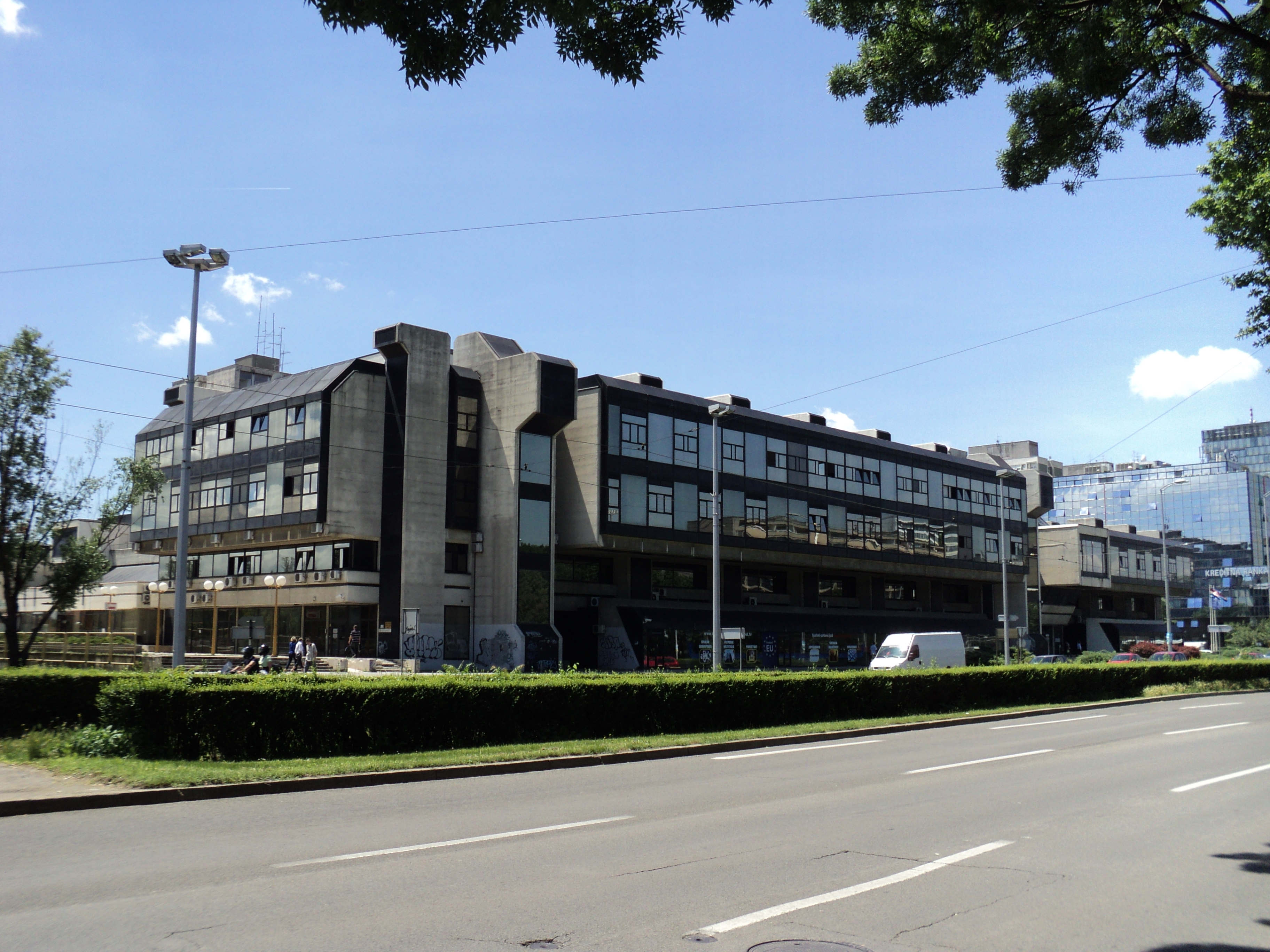 Zgrada ministarstva poljoprivrede, ribarstva i ruralnog razvoja, Vukovarska 78, Zagreb.